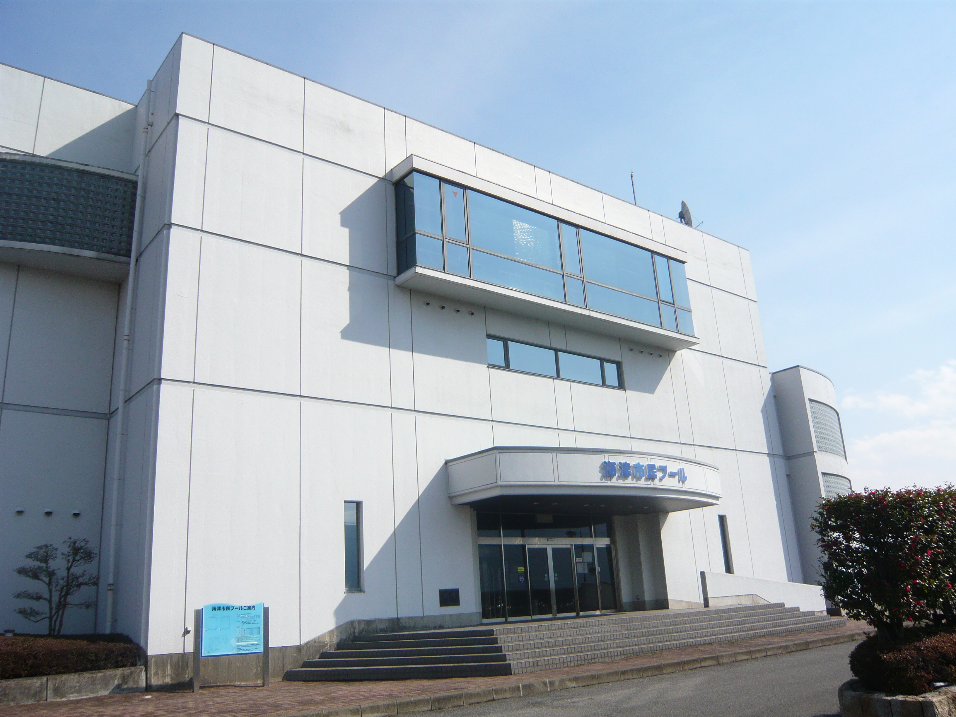 Kaizu Citizen Pool（海津市市民プール）,Kaizu,Gifu,Japan（岐阜県海津市）で撮影。